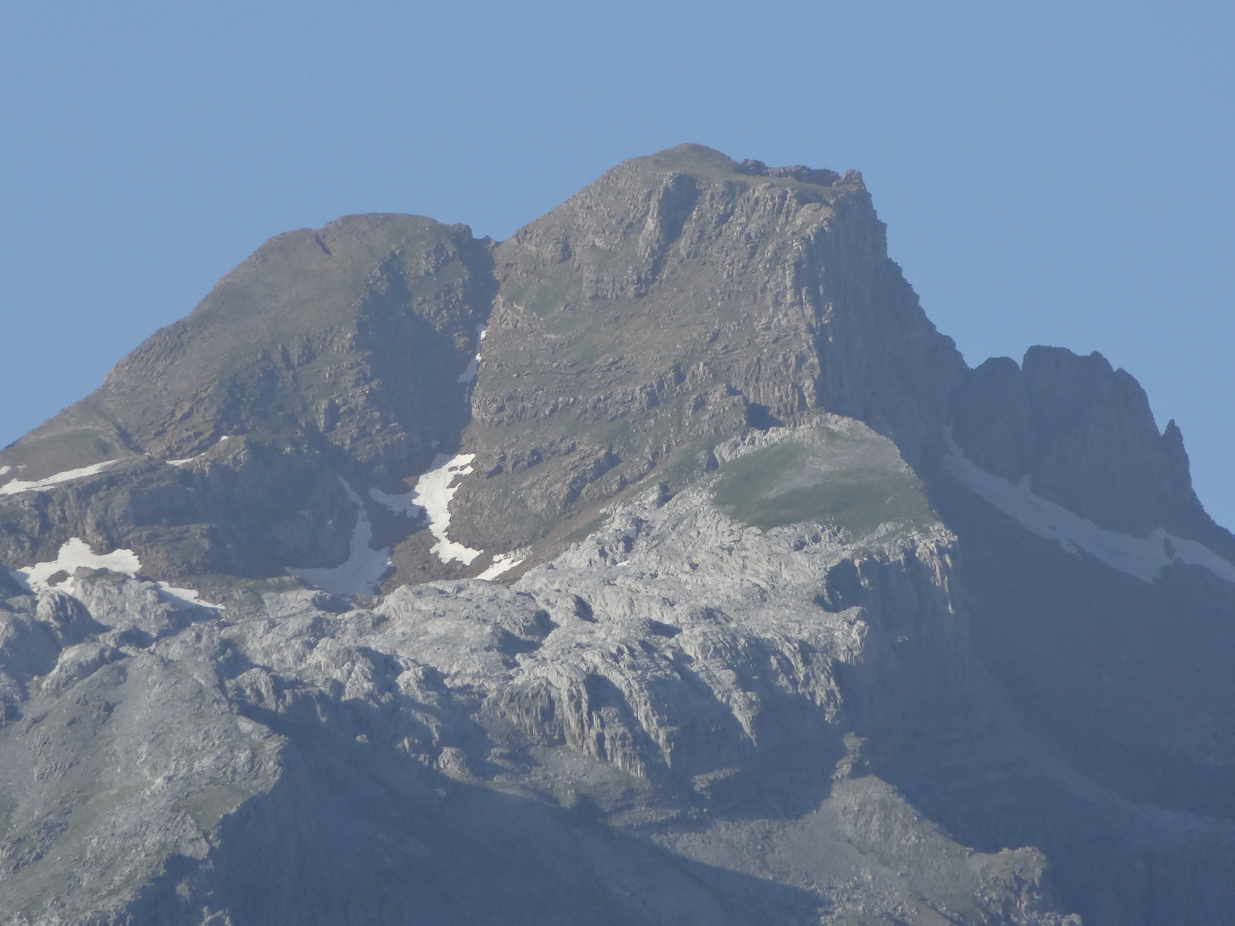 Pic d'Aspe